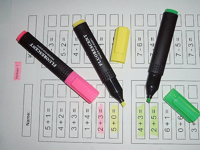 selbst fotografiert, PD und GNU-Fdl, Bild: Farbige Neontextmarker. Lizenz